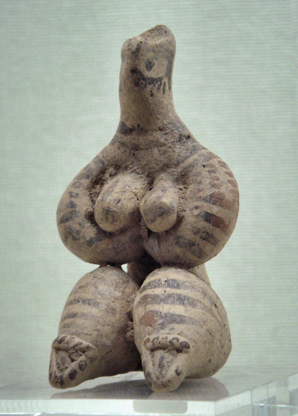 FemaleFigurineSyria5000BCE